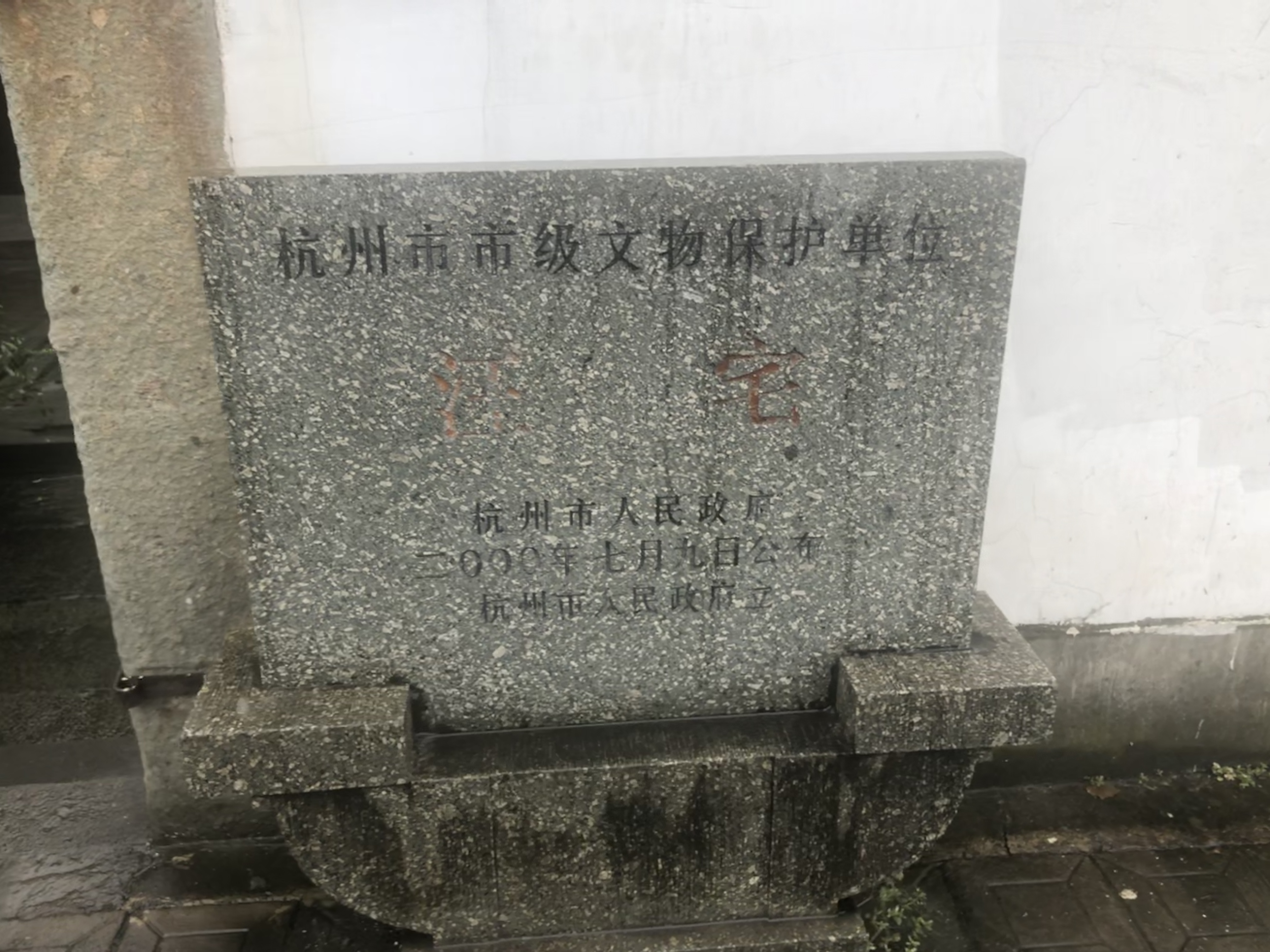 汪宅杭州市文物保护单位碑文